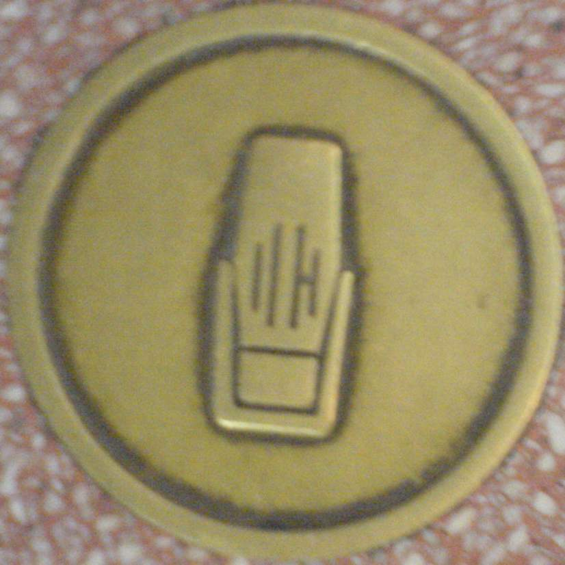 Symbol der Kategorie Radio (radio) der Sterne auf dem Hollywood Walk of Fame.